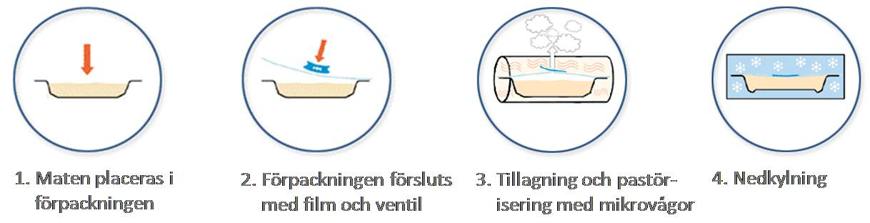 Principiell beskrivning av MicVac-metoden, en industriell produktionsteknik för produktion av färdigmat.